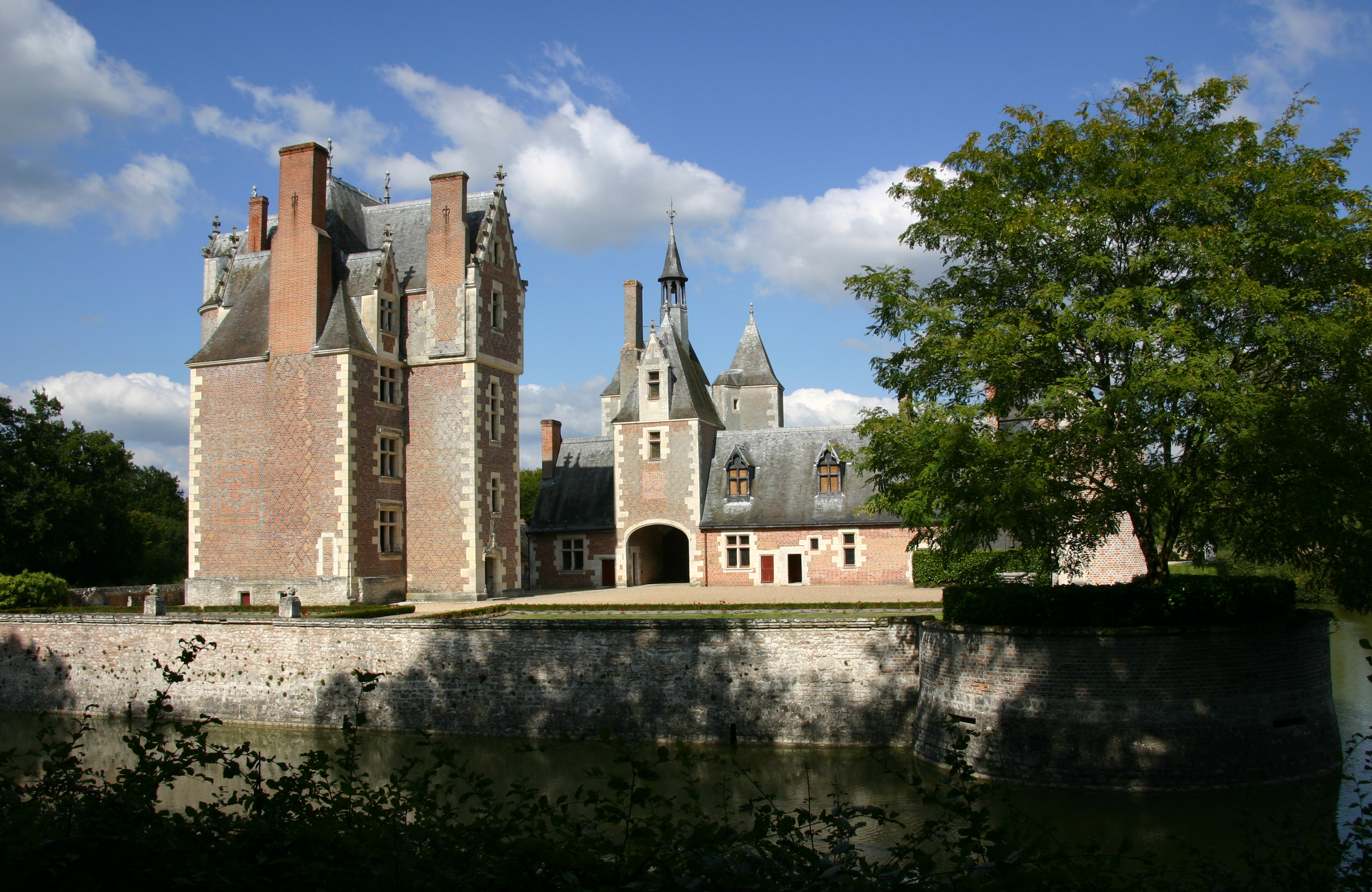 Schloss Le Moulin